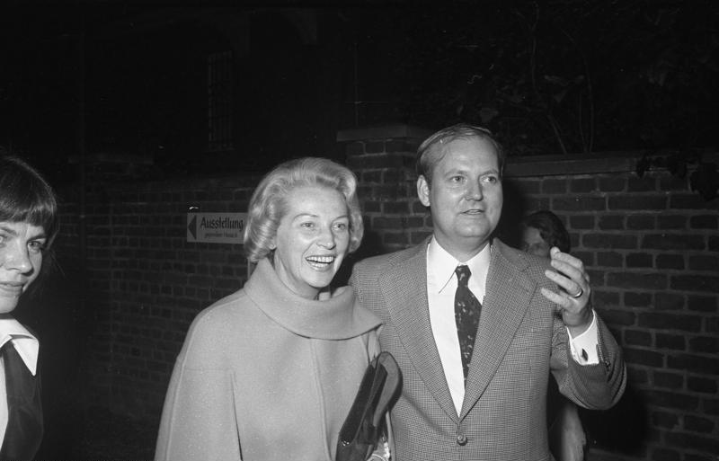 Laubenpieperfest in der Landesvertretung Berlin in Bonn (links: Annemarie Renger, rechts: Dietrich Stobbe)